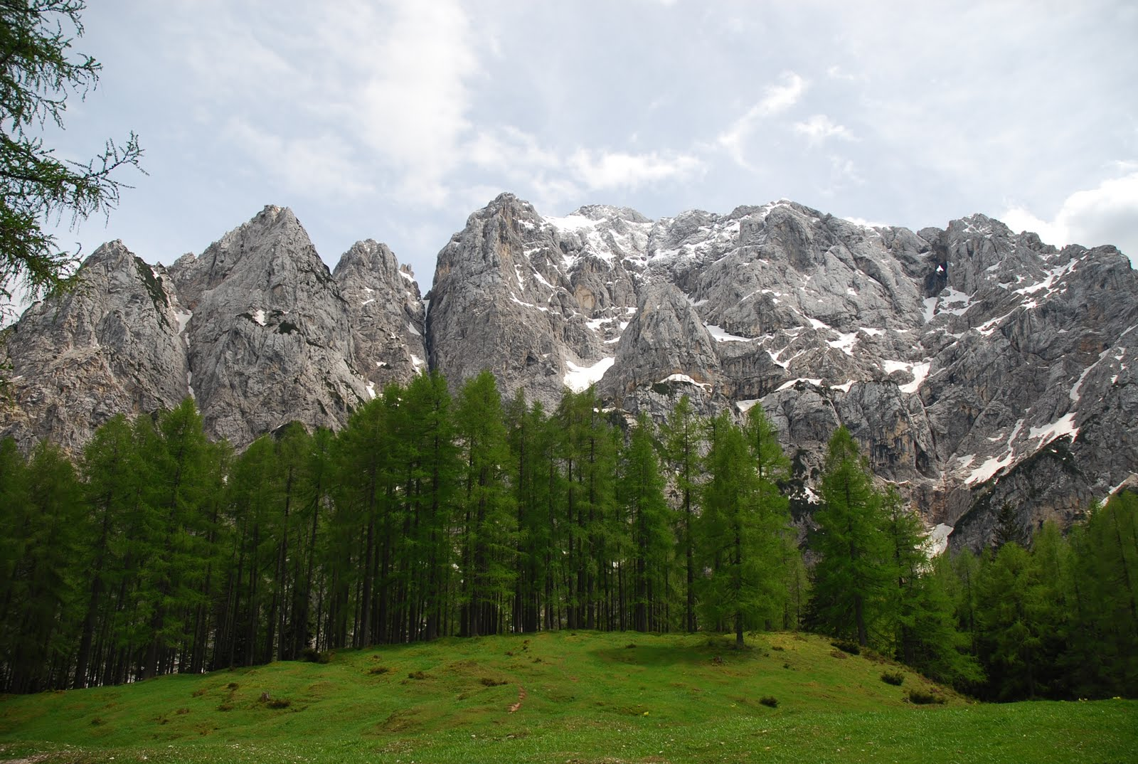 slovenia 2013